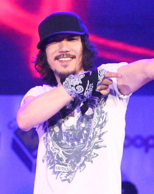 LG전자가 29일 저녁 잠실 올림픽공원에서 ‘제 4회 CYON 비보이 챔피언십 2010’ 본선대회를 열었다. ‘07년에 시작된 이 행사는 올해로 4회째를 맞는 명실상부 국내 최대 비보이 축제로 자리잡았다. 이날 행사에서는 3,000여 명의 관람객들이 참석한 가운데, 비보이들의 화려한 댄스 배틀과, 은지원, 에픽하이, 타이거JK, 윤미래, 앰블랙, 슈프림팀 등 국내 인기 가수들이 참여한 ‘롤리팝 콘서트’가 함께 진행됐다. 5월부터 전주, 부산, 서울에서 열린 예선에 참가한 83개 팀간 치열한 경합 끝에 선발된 8개 팀이 최종승부를 펼쳤다. 치열한 경합 끝에 ‘갬블러 크루(Gamblerz Crew)’가 챔피언에 올라 일천만원의 상금과 함께 향후 1년간 CYON 비보이팀 자격과 공식 후원을 받게 된다. ‘갬블러 크루’는 부산예선 1위팀으로 비보이 월드컵이라 불리는 ‘배틀오브더이어(Battle of the Year)’에 한국대표로 출전, 2004년과 2009년에 우승한 대한민국 대표 비보잉팀이다. LG전자 MC사업본부 한국마케팅팀 신현준 팀장은 “올해 4회째를 맞은 CYON 비보이 챔피언십은 올해도 뜨거운 열기 속에 젊은 세대의 최고 축제가 됐다”며 “YG(Young Generation)세대들을 위한 다양한 문화공감 프로젝트를 지속적으로 추진할 것”이라고 밝혔다.